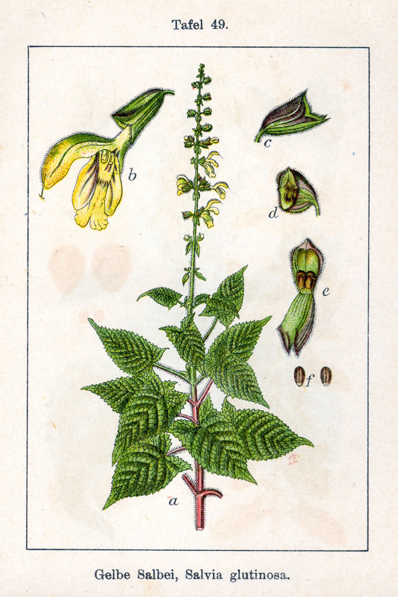 Salvia glutinosa L. Original Description Gelbe Salbei, Salvia glutinosa